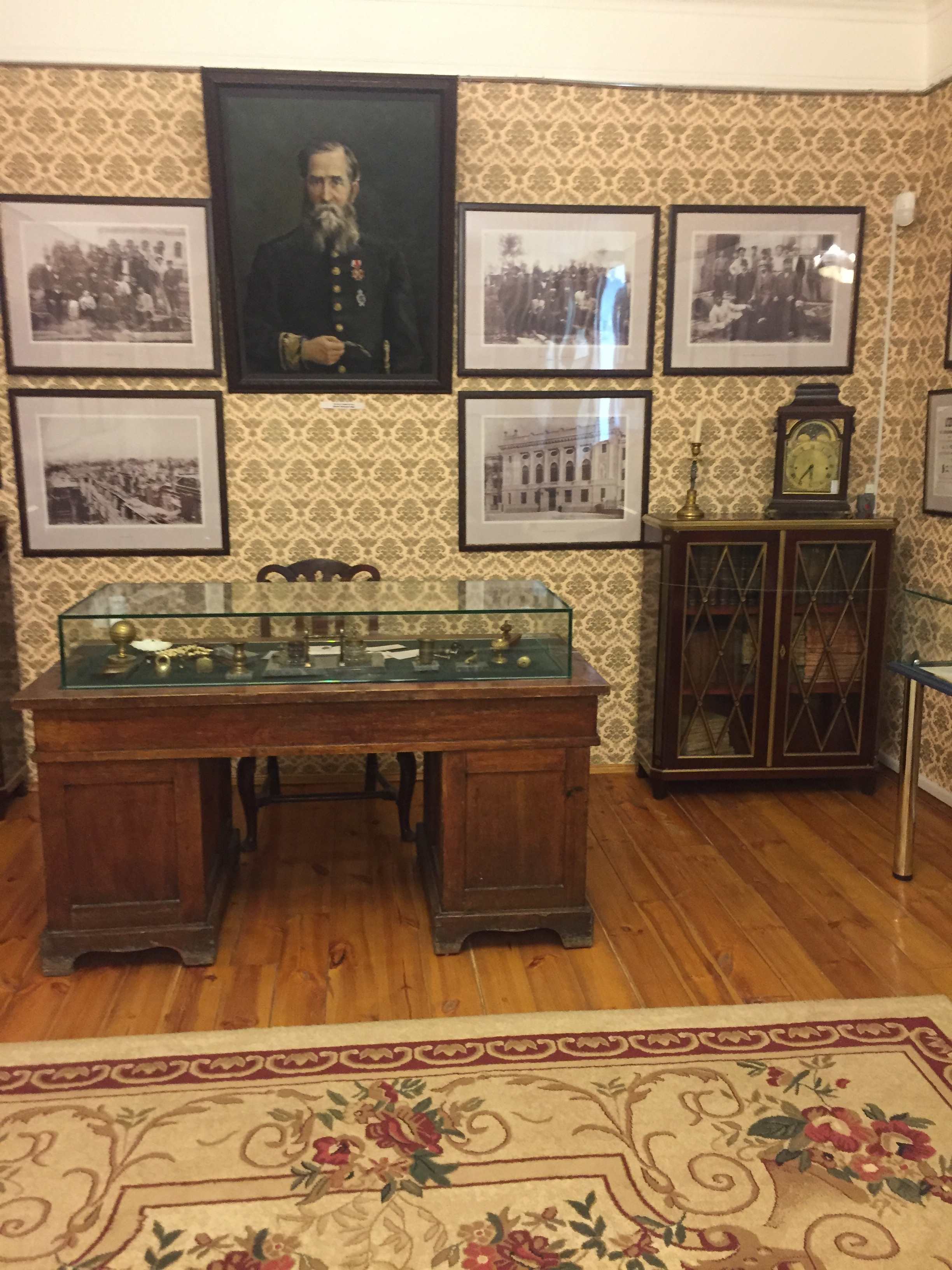 Кабинет купца Кекина